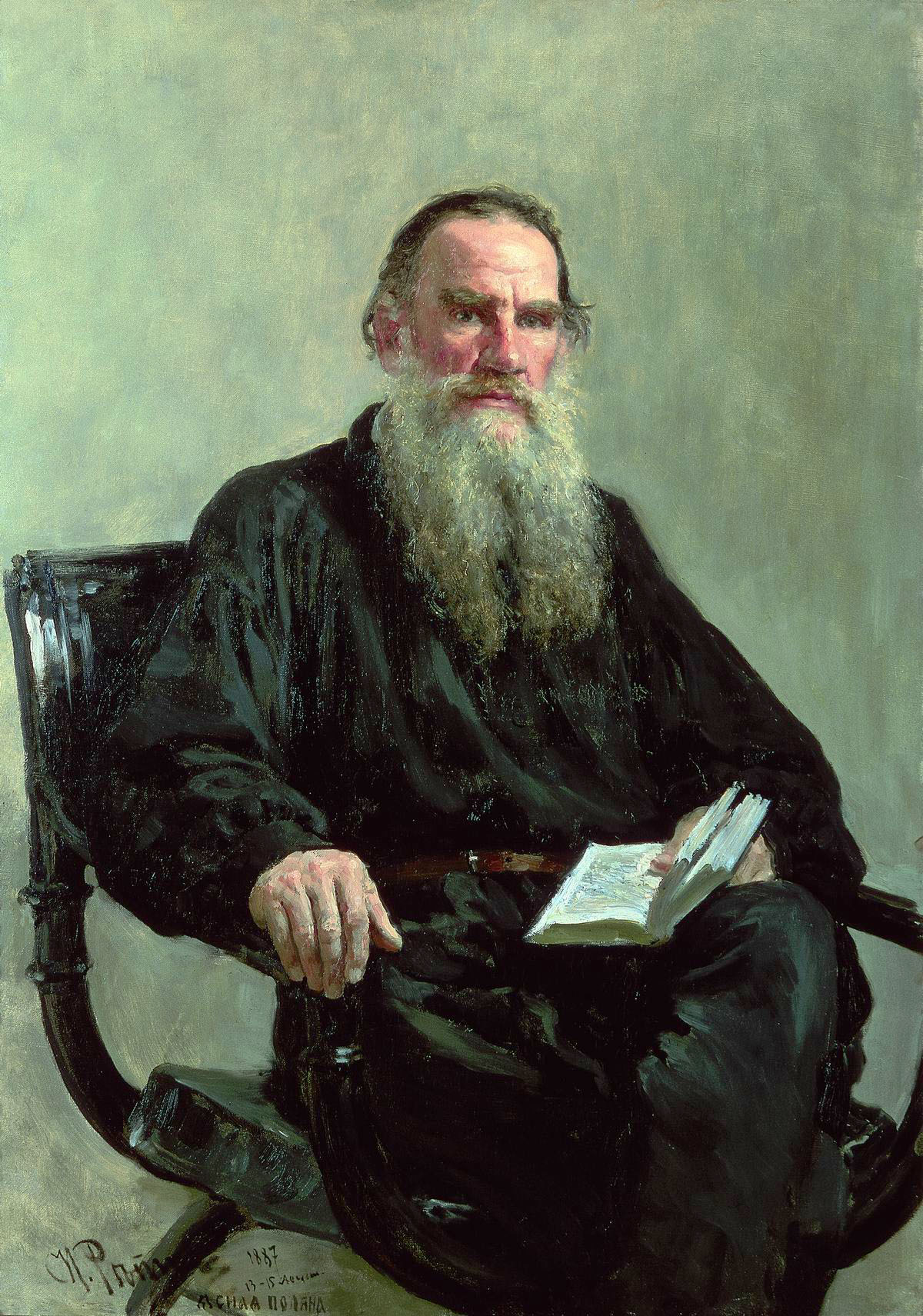 Retrato de Lev Nikoláyevich Tolstói